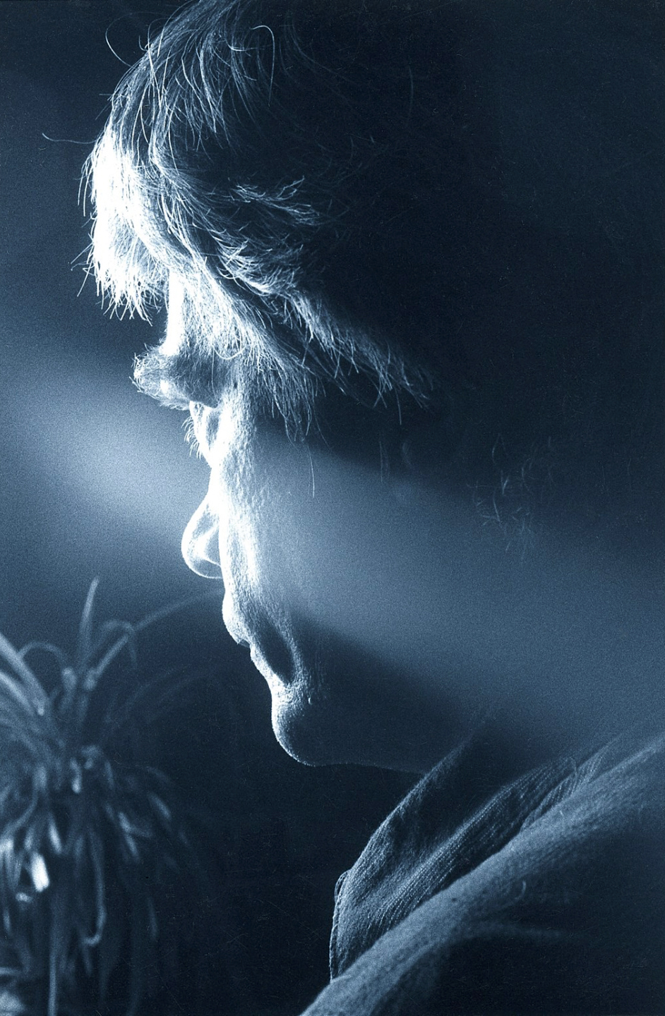 Mati Sirkel